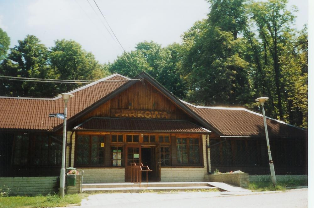 Restauracja Parkowa w Swoszowicach, zdjęcie własnego autorstwa (2006)